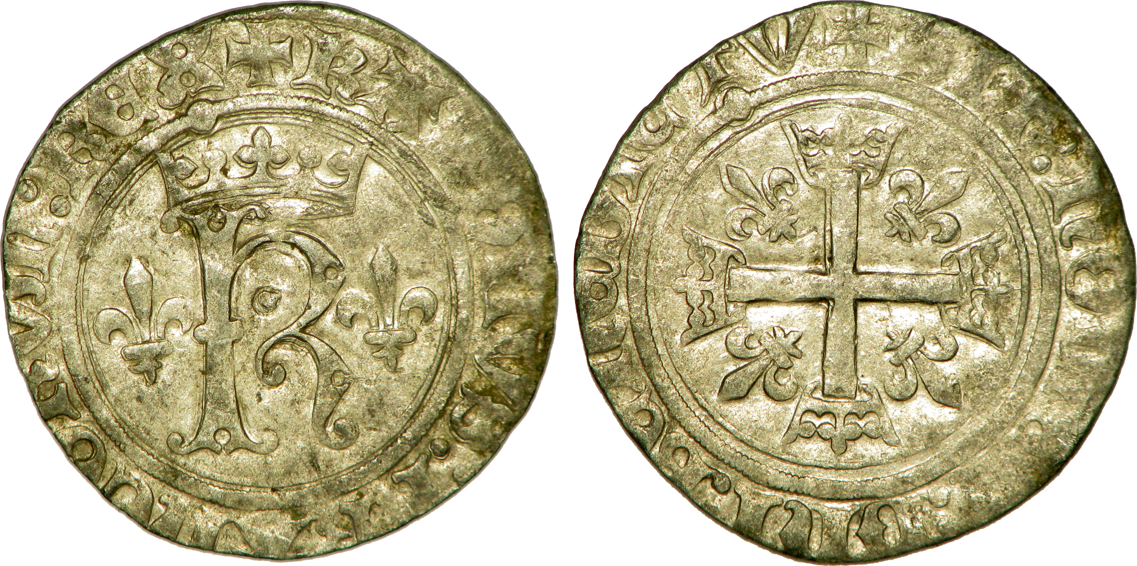 Nom de l'atelier/ville : Saint-Lô Métal : billon Diamètre : 24,5mm Axe des coins : 6h. Poids : 2,46g. Titulature avers : + KAROLVS: FRAnCORVm: REX. Description avers : Grand K oncial couronné, accosté de deux lis. Traduction avers : (Charles, roi des Francs). Titulature revers : + SIT: nOmE[n]: DnI: BEnEDICTV. Description revers : Croix couronnée et cantonnée de quatre lis. Traduction revers : (Béni soit le nom du Seigneur).